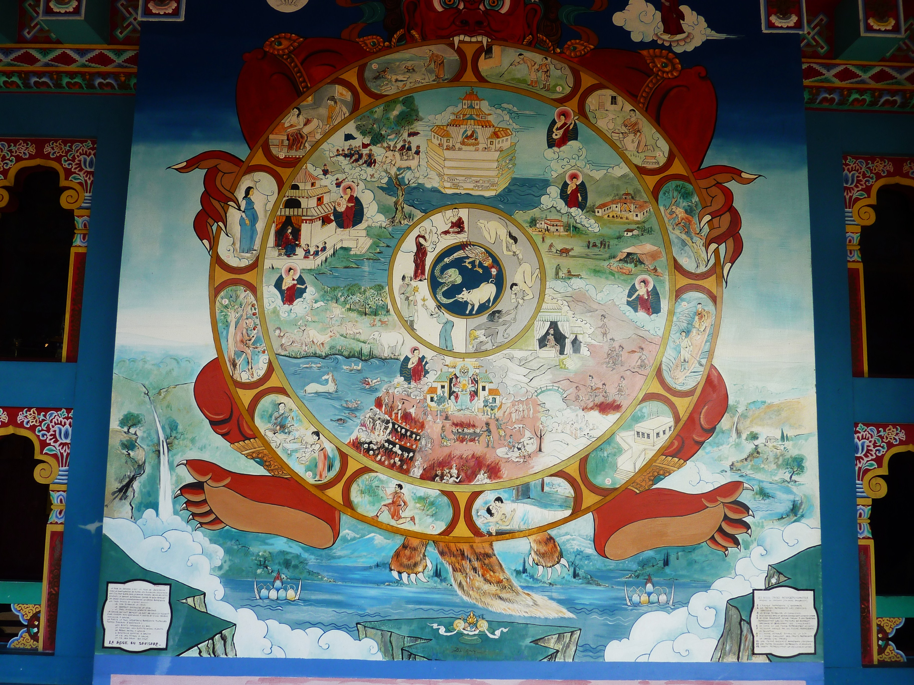 La Boulaye : temple des mille Bouddhas, la roue du Samsara